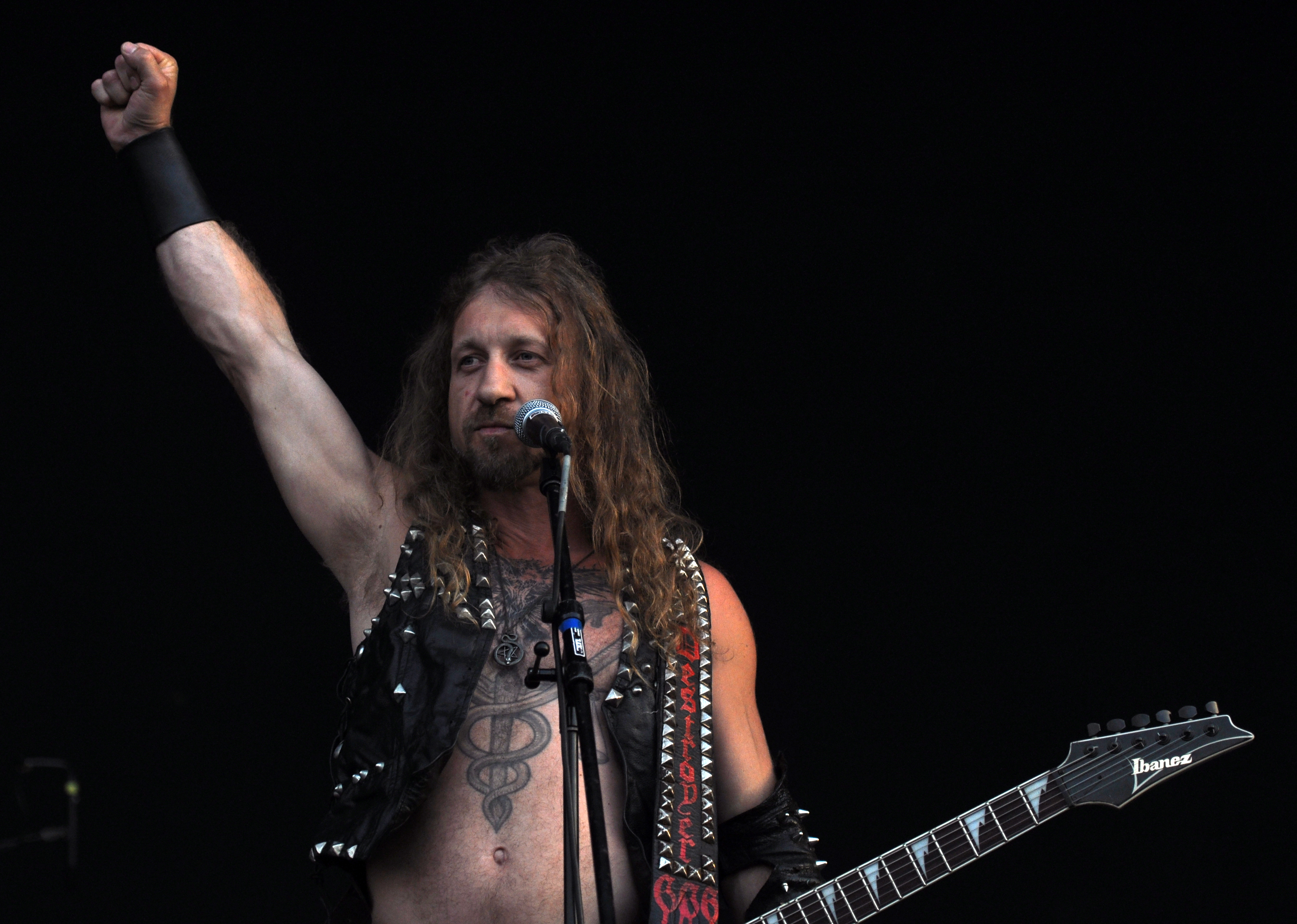 Deströyer 666 beim Party.San Metal Open Air 2013